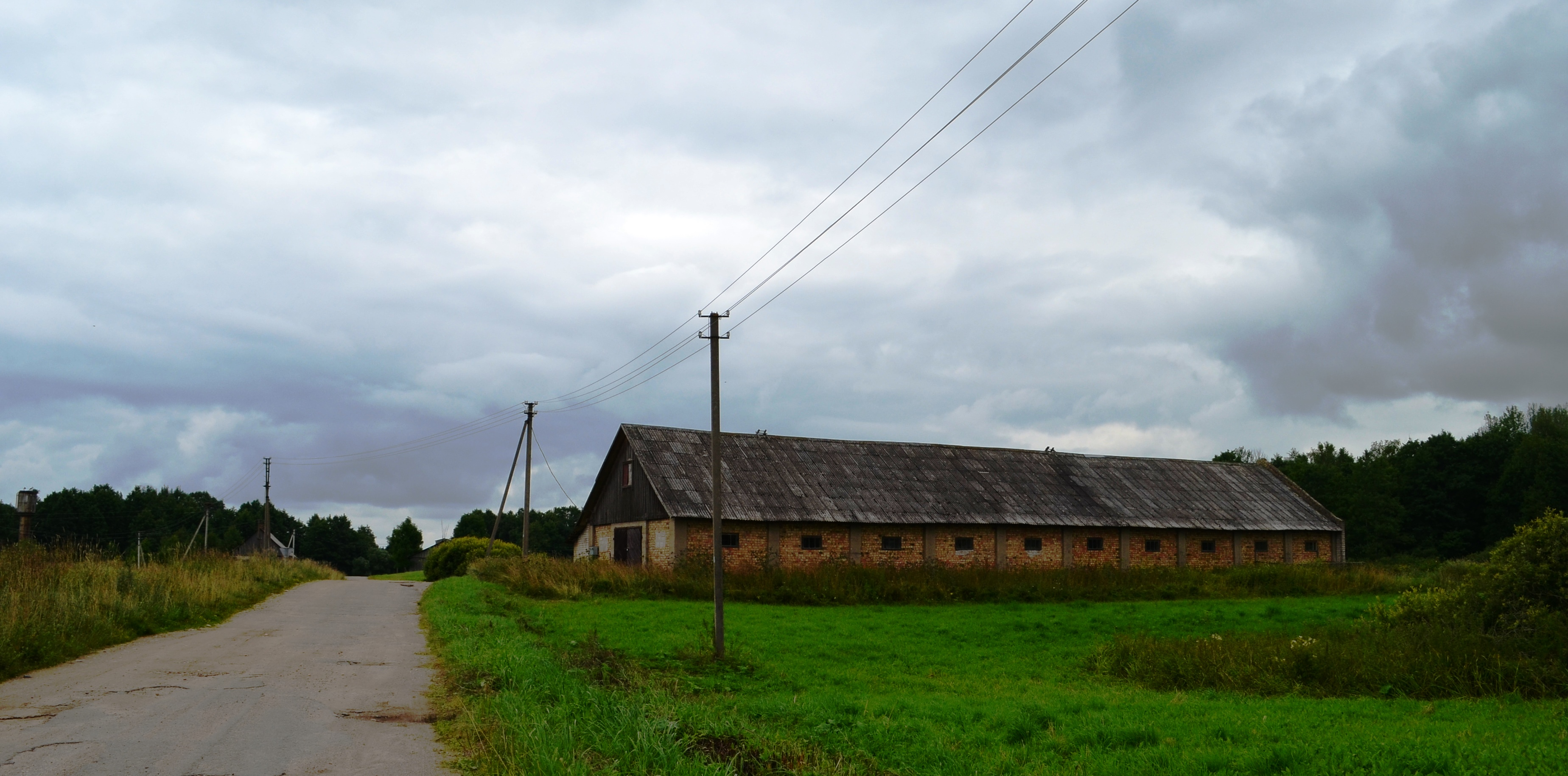 Ažugiriai, Utenos r.